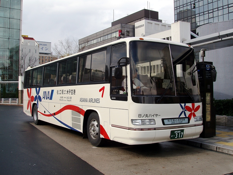 事業者: 日ノ丸ハイヤー 陸運登録: 鳥取200か・317 シャーシ: 日野自動車 U-RU2FTAB 車体: 日野車体工業 年式: 不明 撮影場所: JR松江駅前